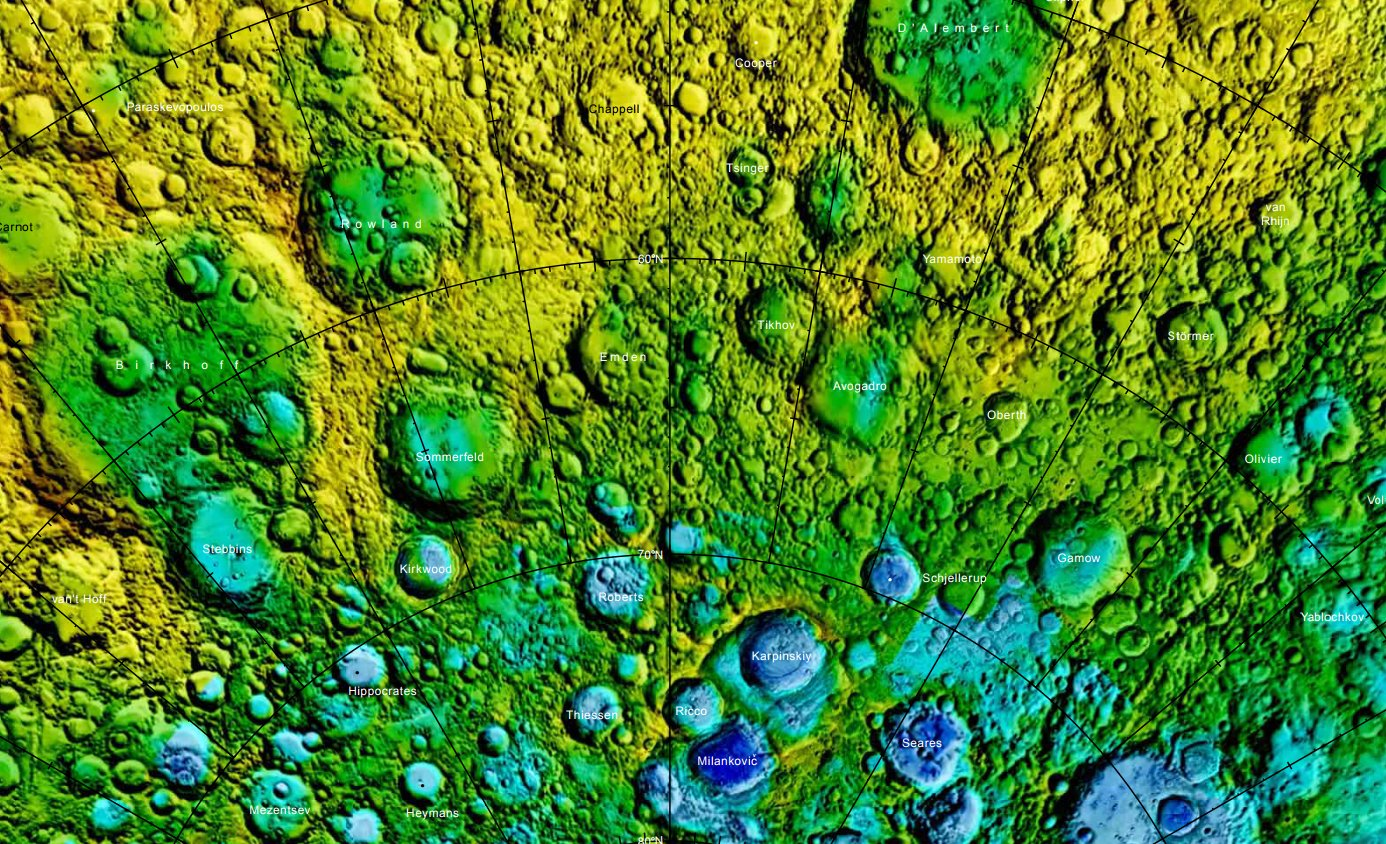 Cráter lunar Rowland. Localización. (Imagen LRO)